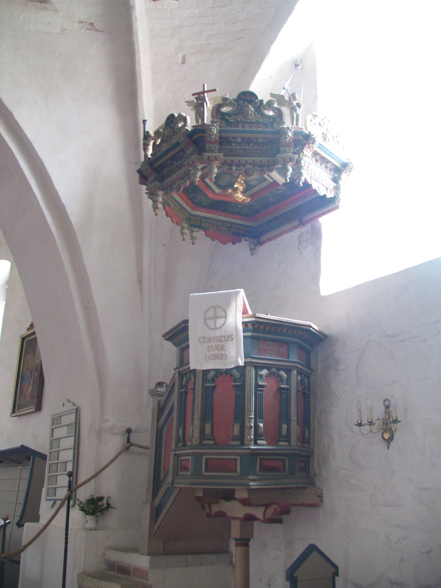 Kanzel aus dem 17. Jahrhundert in der Kirche St. Laurentii auf Föhr